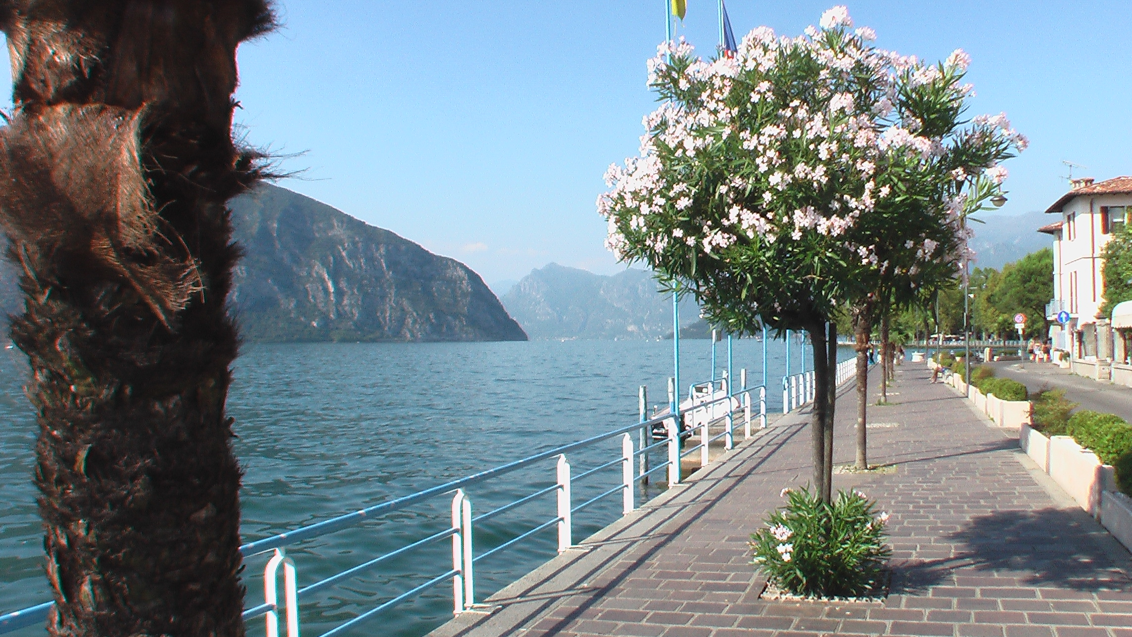 IseoPromenade2008